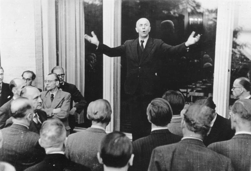 ADN-ZB/ Illus-dpd "Deutschland zwischen Ost und West" Die zweite Jahrestagung der CDU der Ostzone wurde mit einer grossen Rede des ersten Vorsitzenden der CDU der Ostzone, Jakob Kaiser, am 6.9.47 in der Berl. Staatsoper eröffnet. Jakob Kaiser, der seine Rede unter dem Thema "Deutschland zwischen Ost und West" gestellt hatte, machte Vorschläge für den Wiederaufbau und die Bildung einer Gesamtdeutschen Verwaltung. Unser Bild zeigt Jakob Kaiser während der Jahrestagung. 8-9-47 [Herausgabedatum] ADN-Bildarchiv Deutschland, September 1947 Die zweite Jahrestagung der CDU in der sowjetischen Besatzungszone wurde von deren Vorsitzenden, Jakob Kaiser, am 6.9.1947 in der Staatsoper in Berlin mit einer Rede zum Thema "Deutschland zwischen Ost und West" eröffnet. Aufnahme: dpd 835-47